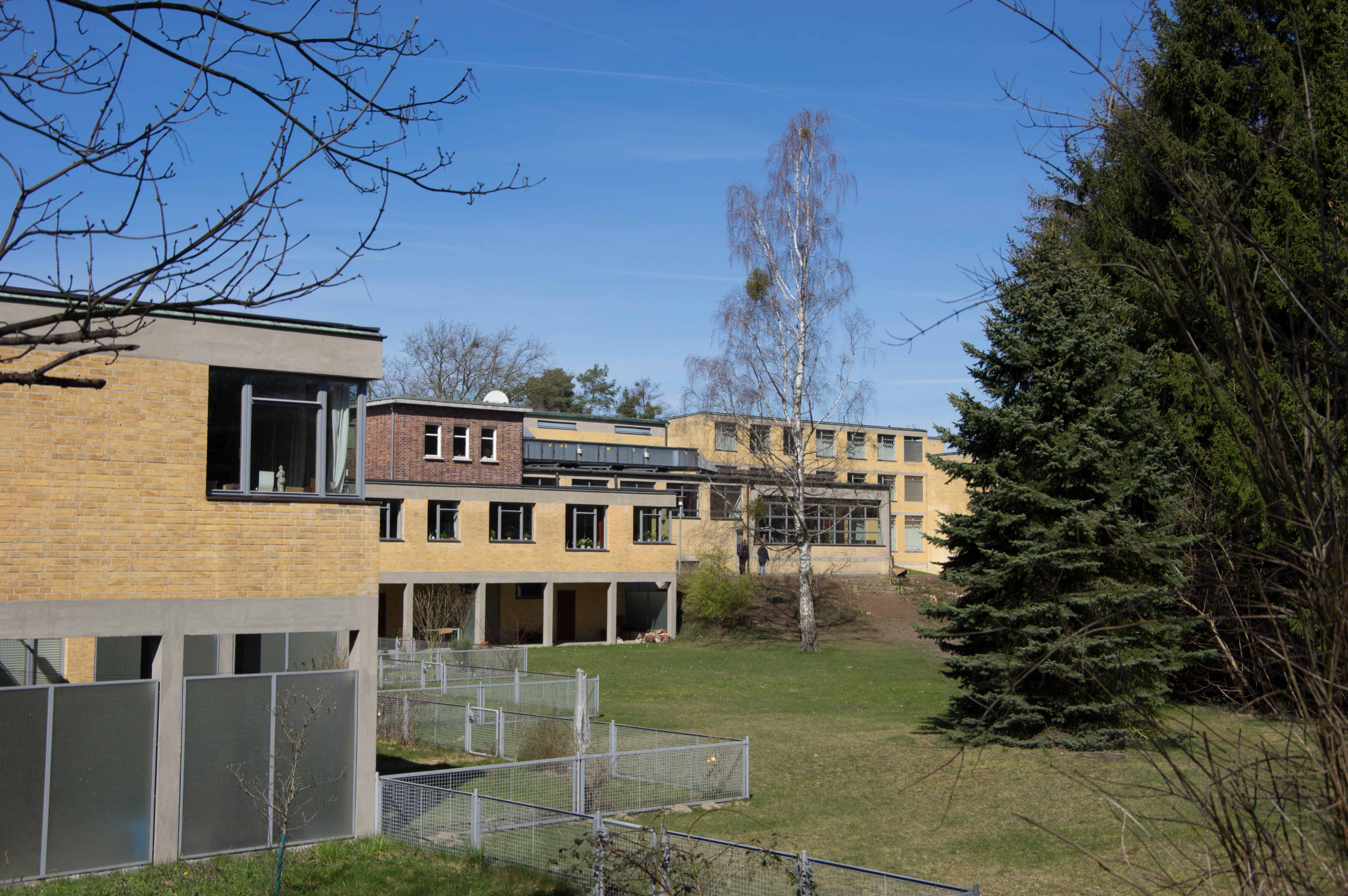 Die Bundesschule des Allgemeinen Deutschen Gewerkschaftsbundes in Bernau bei Berlin wurde 1930 eingeweiht. Architekt war Hannes Meyer. Die Schule wurde im Stil des Bauhauses erbaut, und steht mit anderen Bauhausstätten unter Denkmalschutz und ist Teil des Weltkulturerbes.